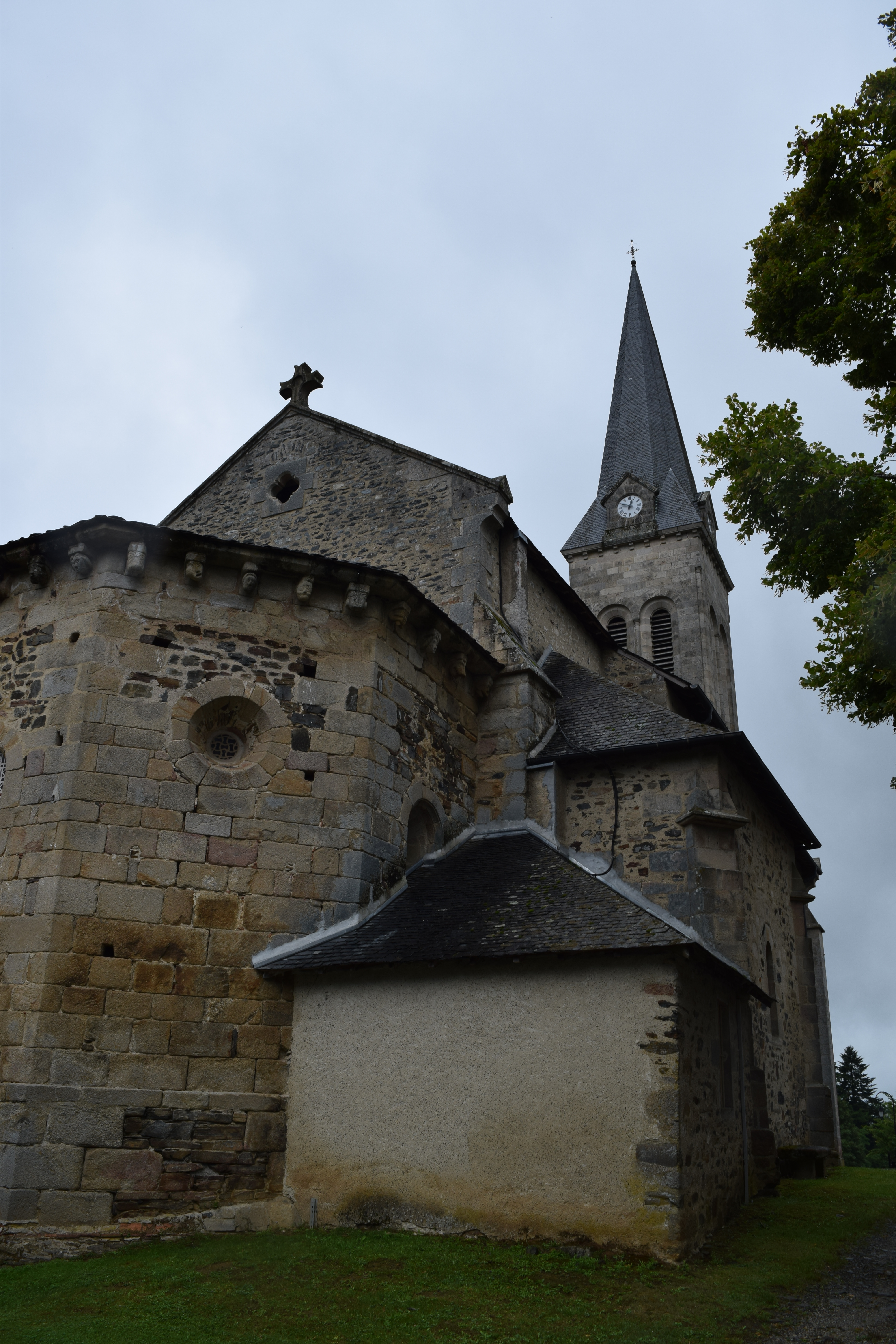 Église Notre-Dame de Seilhac .